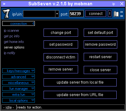 Монгол: Subseven програмын ажиллаж буй цонх